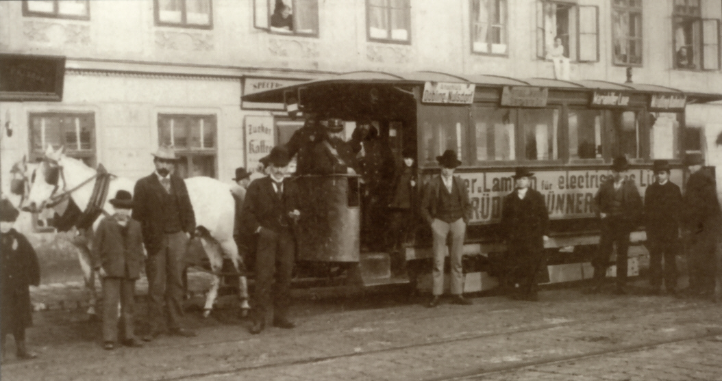 Letzte Fahrt der Neuen Wiener Tramwaygesellschaft auf der Vorortelinie (1898), Eichenstraße 52, Wien-Meidling